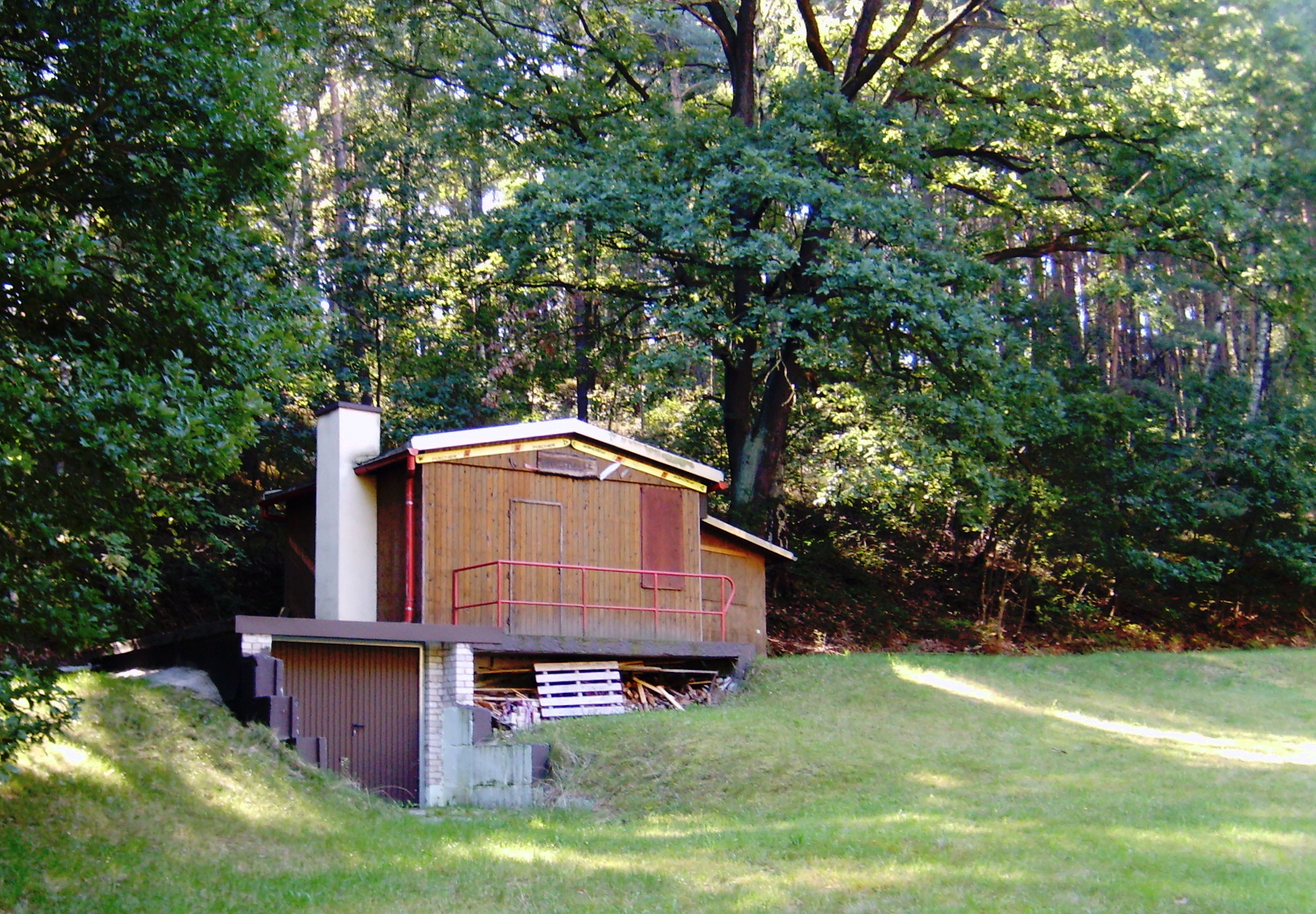 Skihütte bei